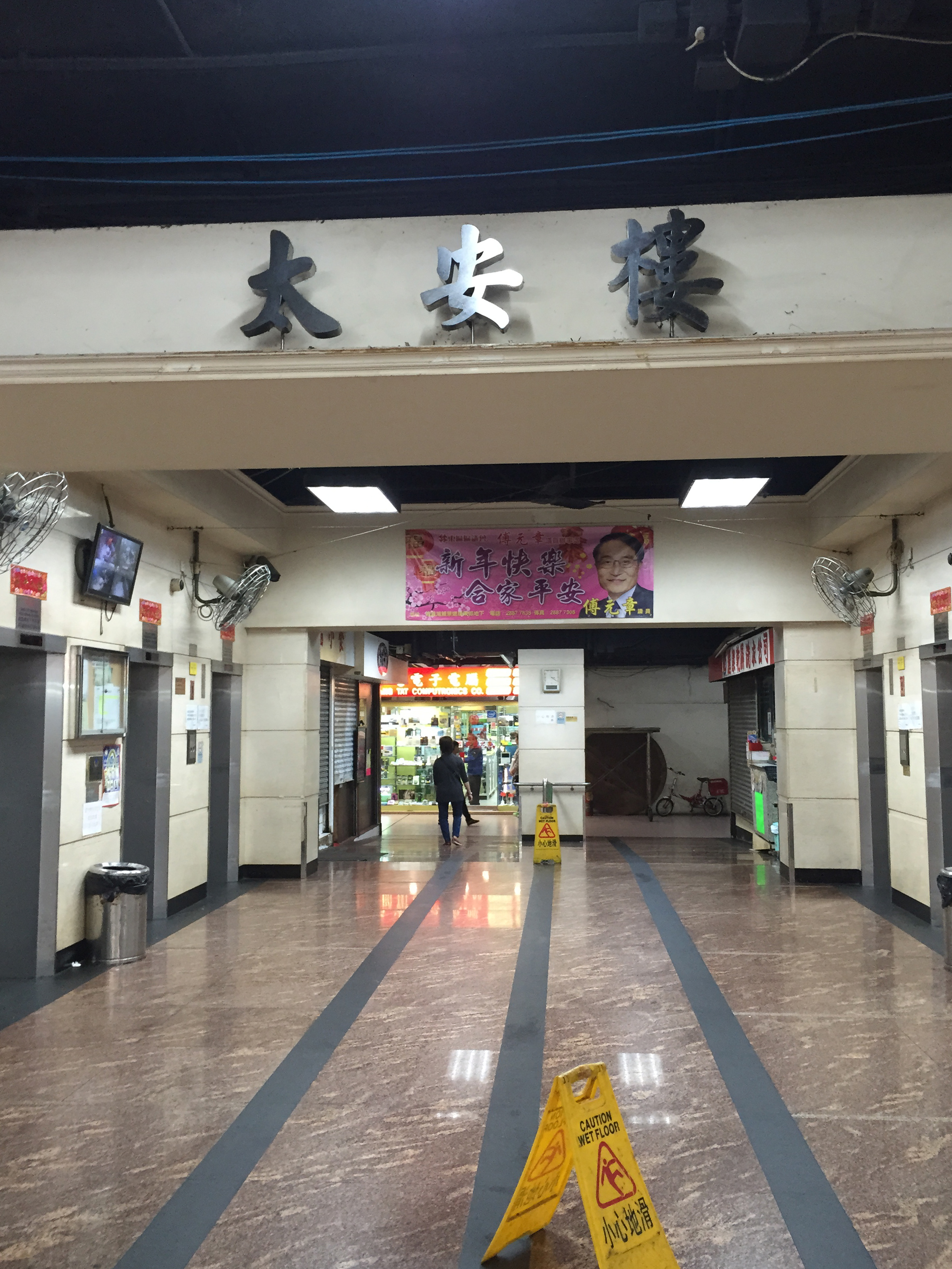 Tai On Building's lobby